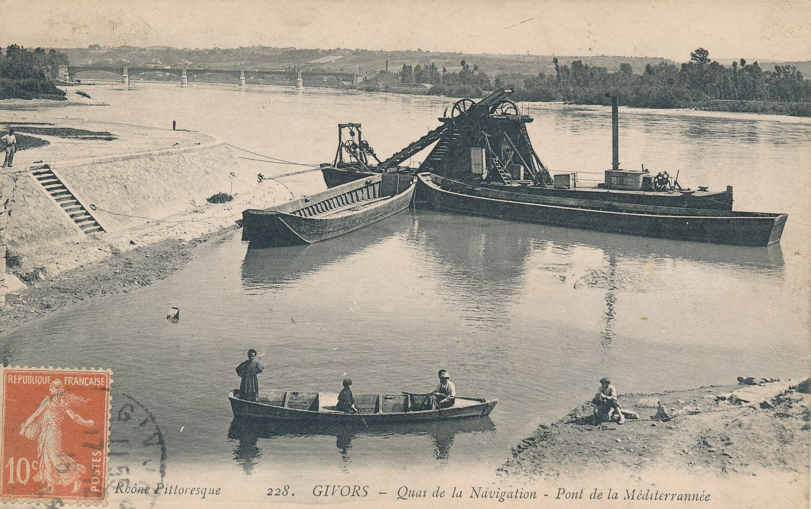 Quai de la navigation, Givors. Archives municipales, cote 5Fi 2191 1